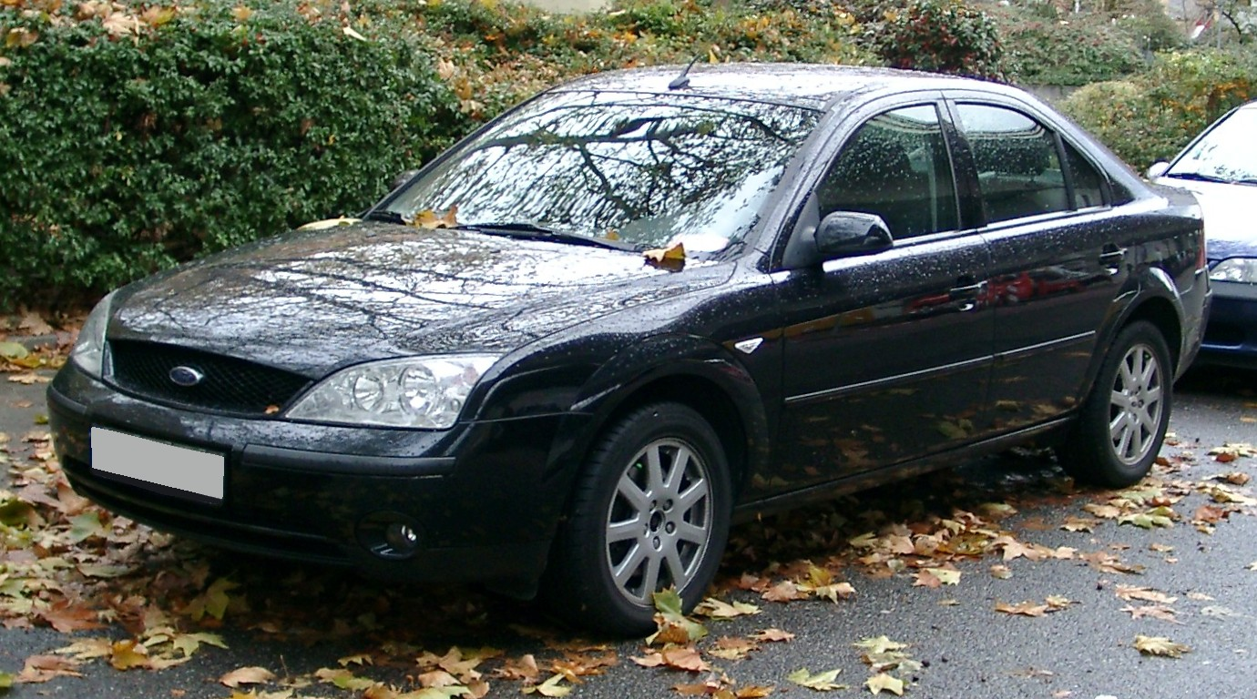 Ford Mondeo 2. Generation